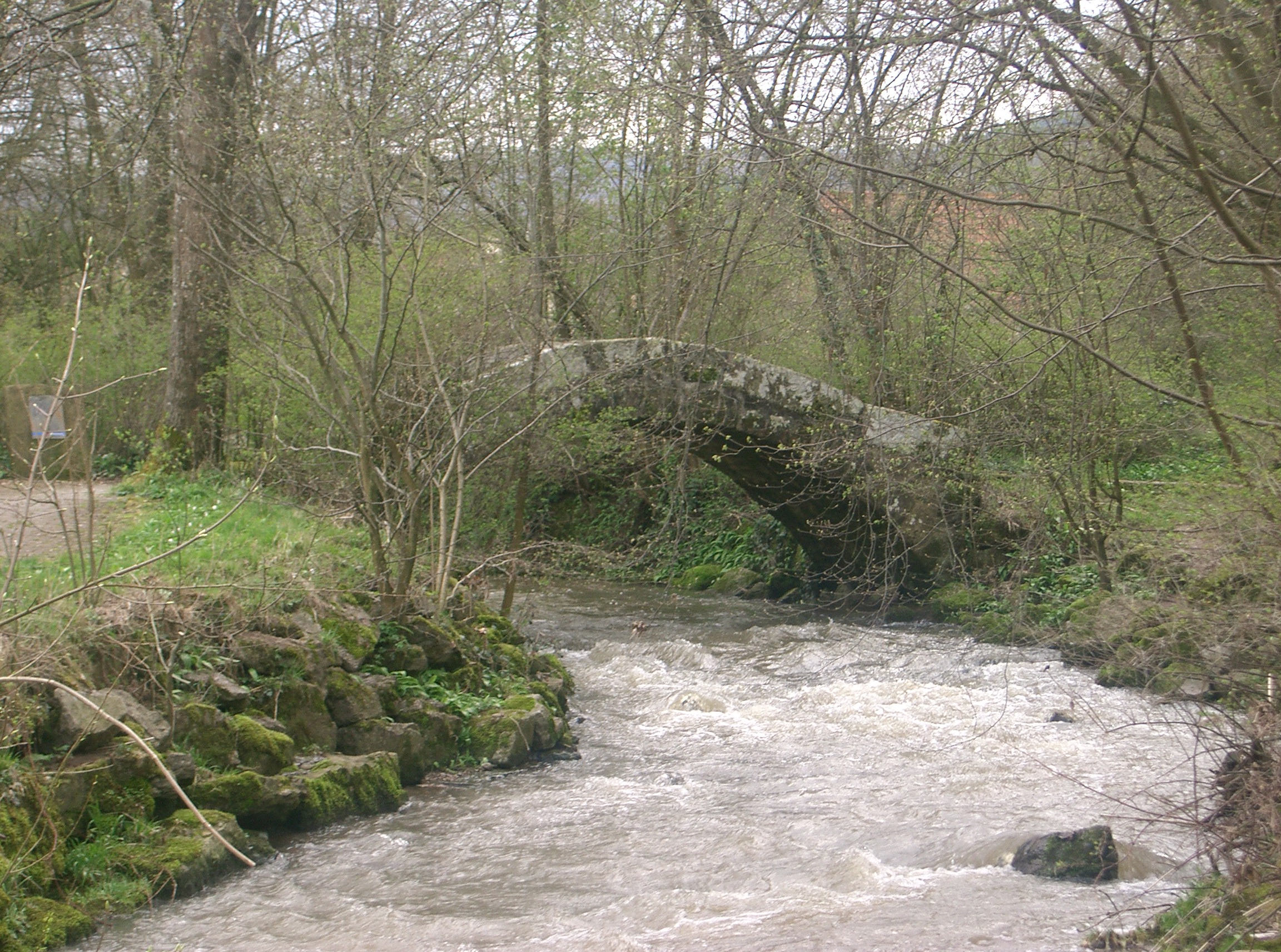 Die historische Pfarrbrücke überdie Ohrn in Untersteinbach